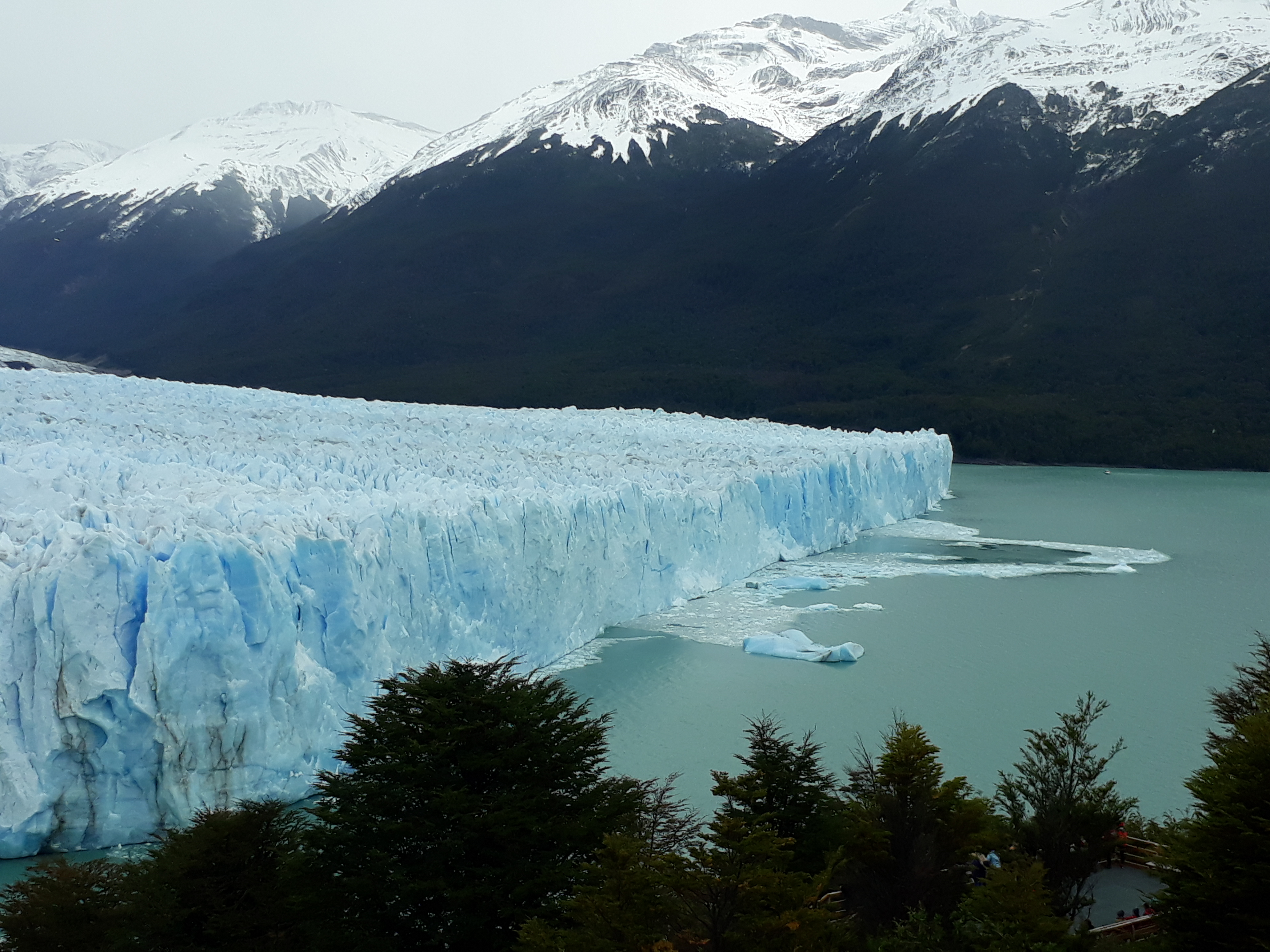 Vista del Glaciar Perito Moreno y del Lago Argentino